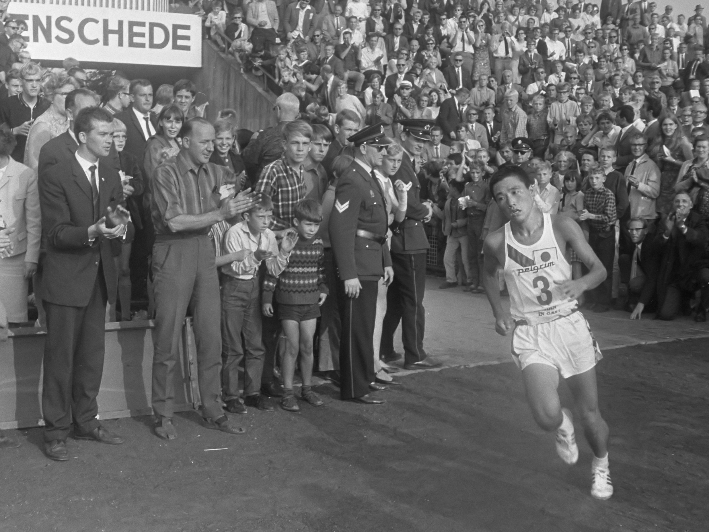 Elfde Internationale Marathon Enschede. Aankomst Yoshiro Mifune (Japan) in Diekmanstation winnaar 26 augustus 1967